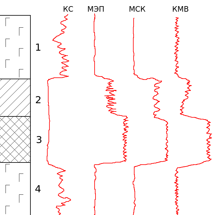 Наглядное различие разных типов руды методами МЭП, МСК, КМВ